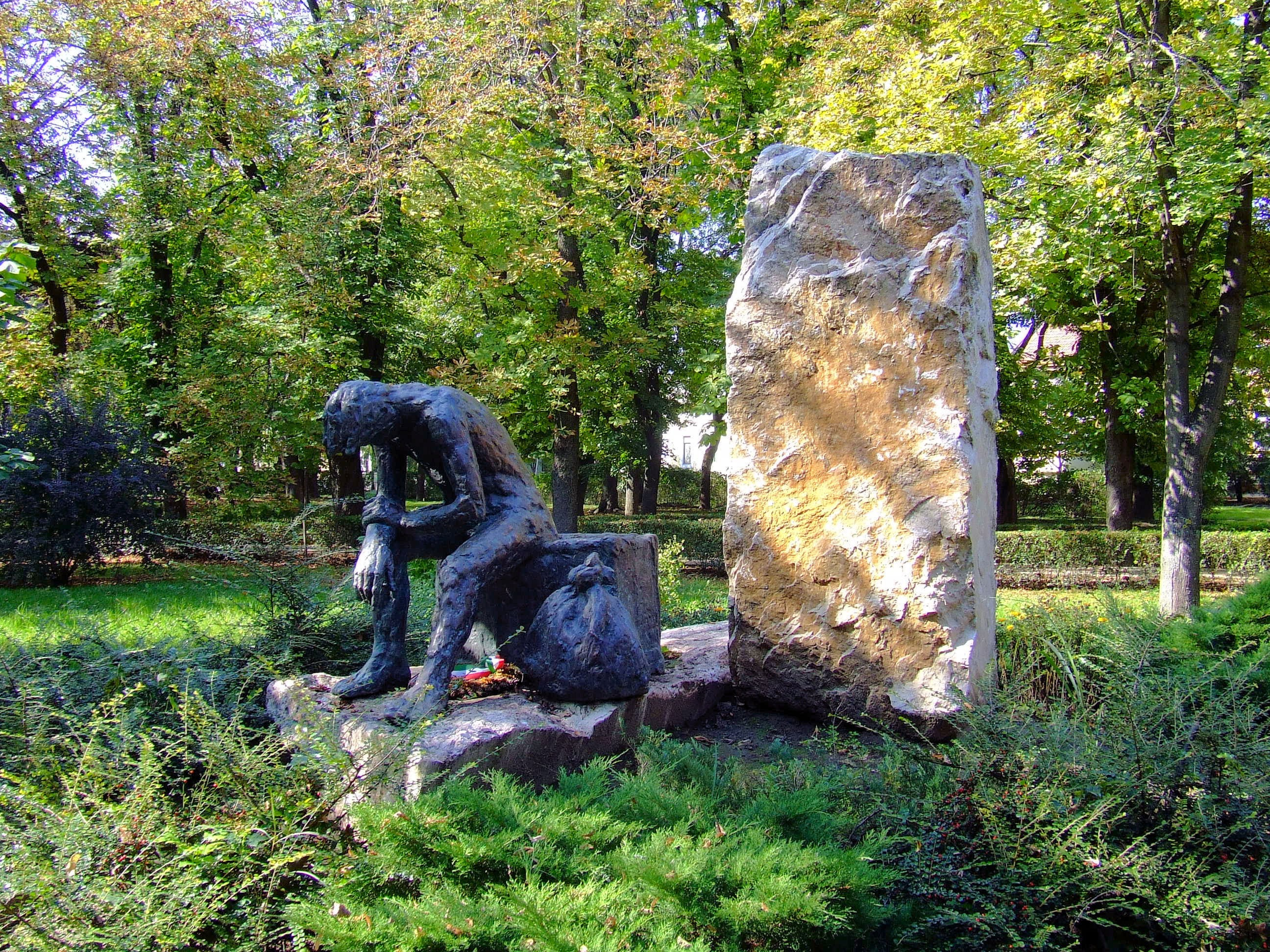 Szülőföldjükről elűzött népek emlékműve Bácsalmáson. Fusz György alkotása (1997)